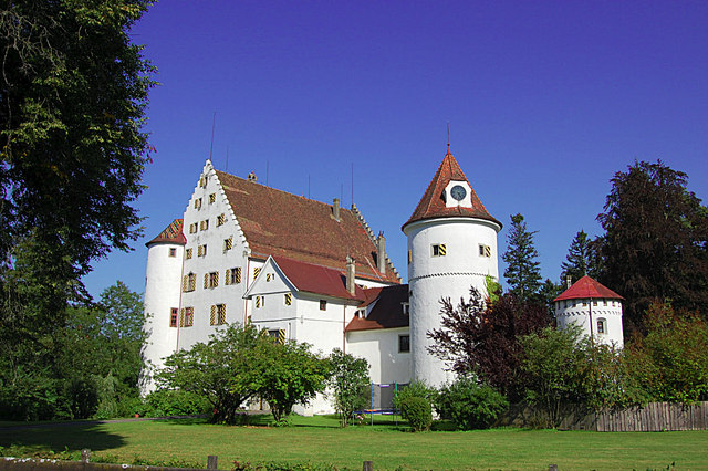 Syrgenstein: Schloss